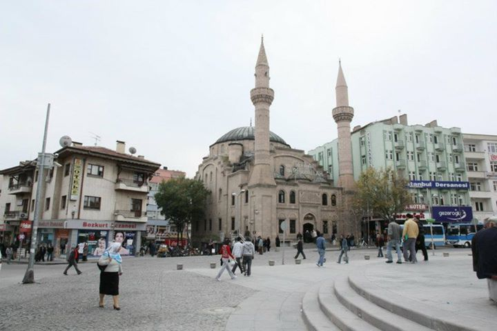 aksaray city